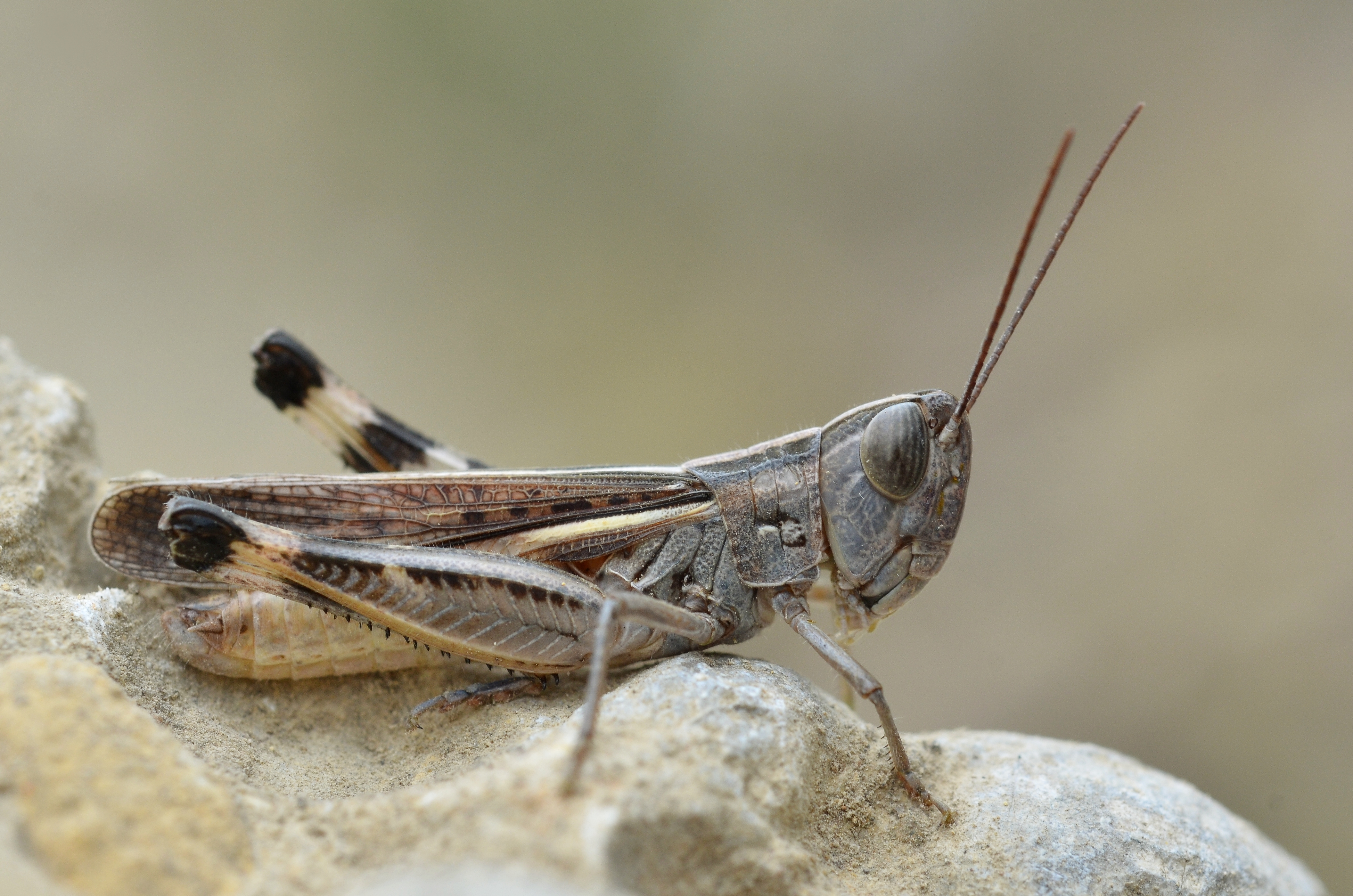 Ramburiella hispanica male